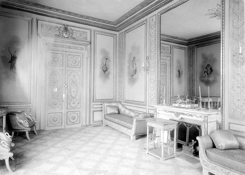 Salon d'argent, porte et cheminée